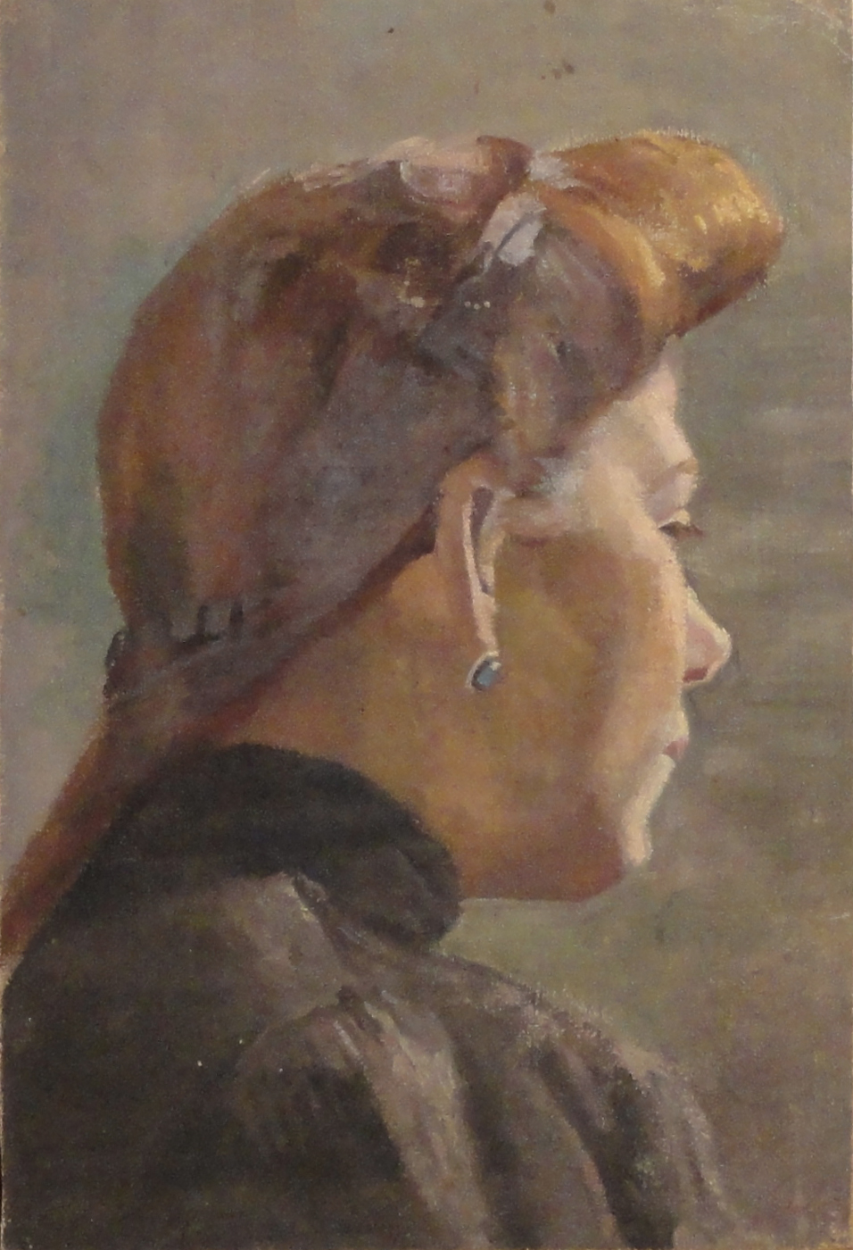 Painting